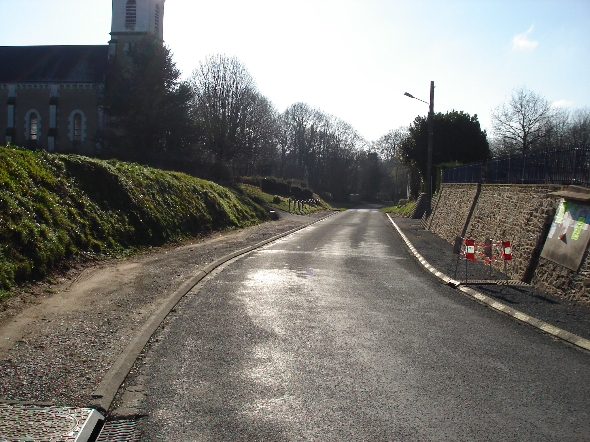 Lignerolles (36) : Le Bourg (route départementale 71).